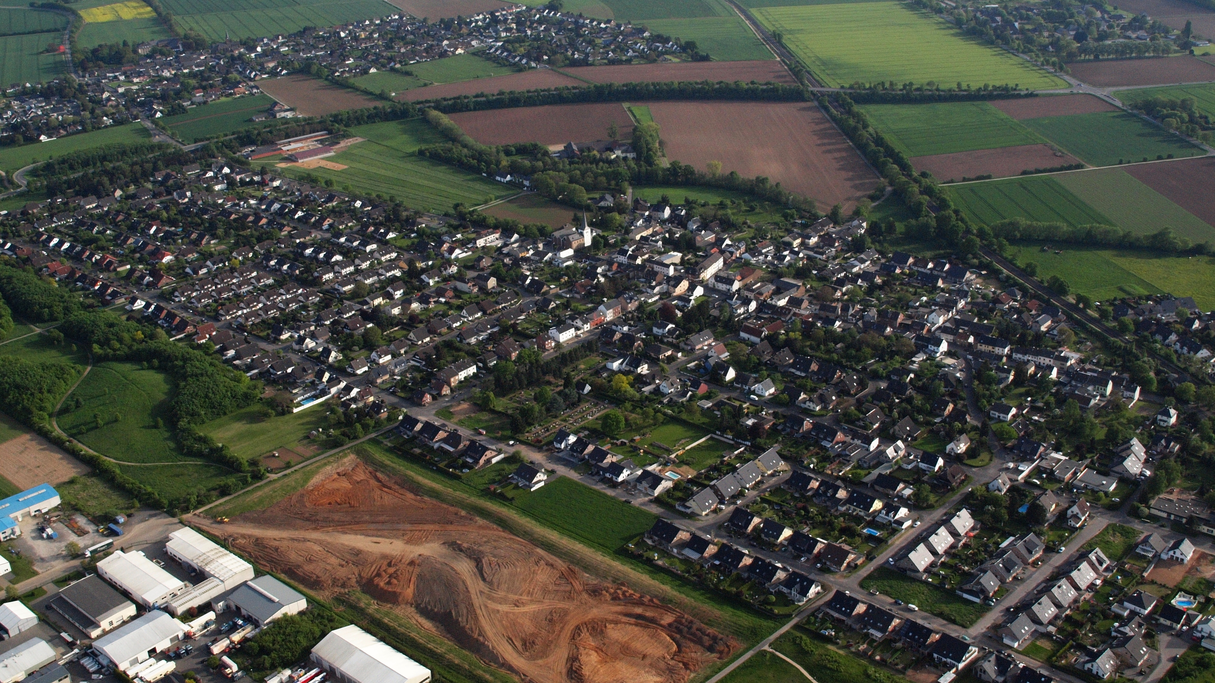 Großbüllesheim, Luftaufnahme (2015)